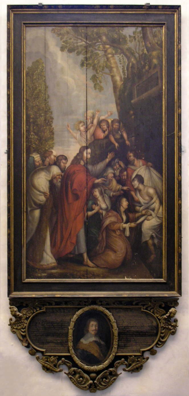 Ein Gemälde in der Klosterkirche Ichtershausen (Thüringen).